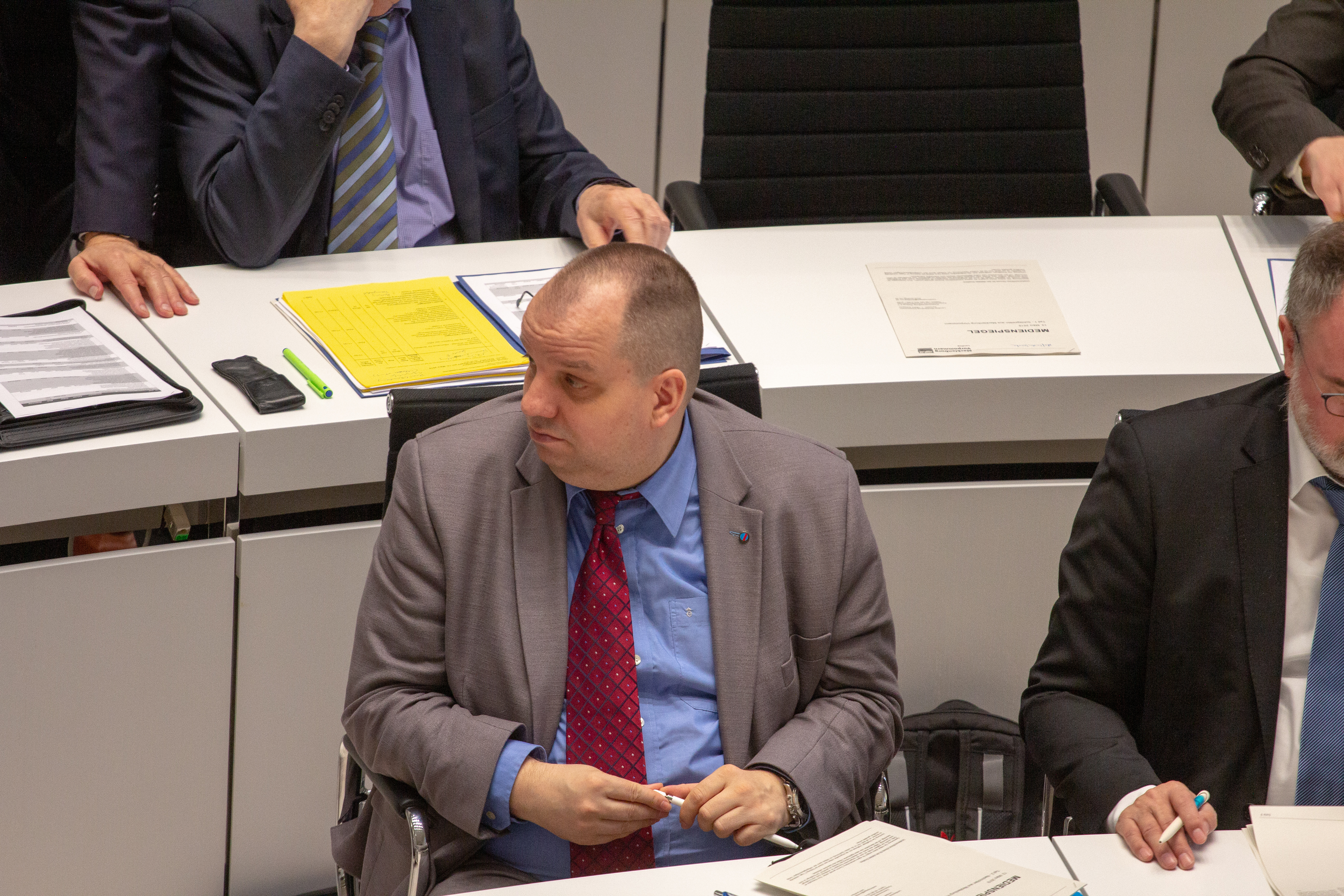 Jens-Holger Schneider im Plenum des Landtages Mecklenburg-Vorpommern im März 2019.